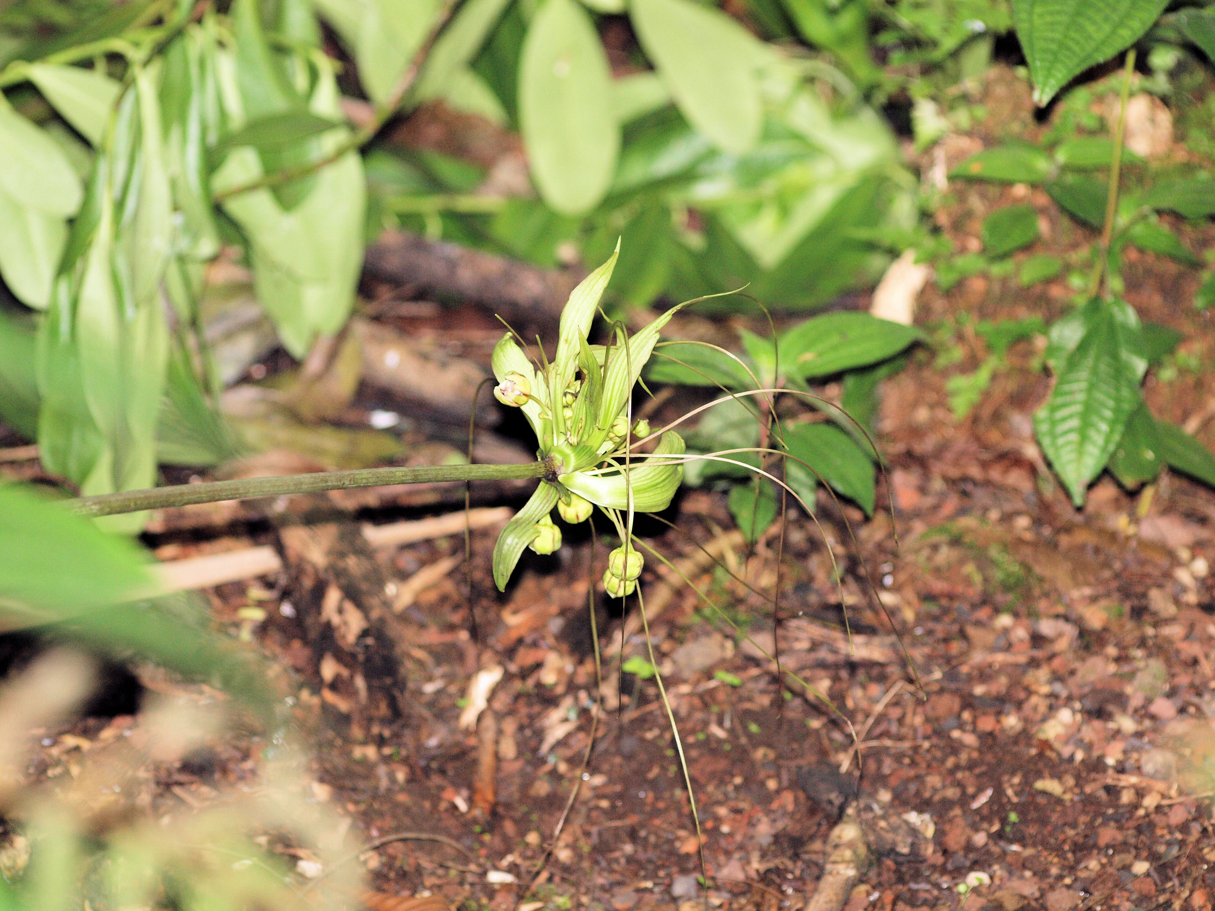 Die Blüte einer Madagaskar-Fledermausblume (Tacca ankaranensis). Der tragende Stängel ist abgeknickt. Aufgenommen in der Masoala-Halle des Zoo Zürich.